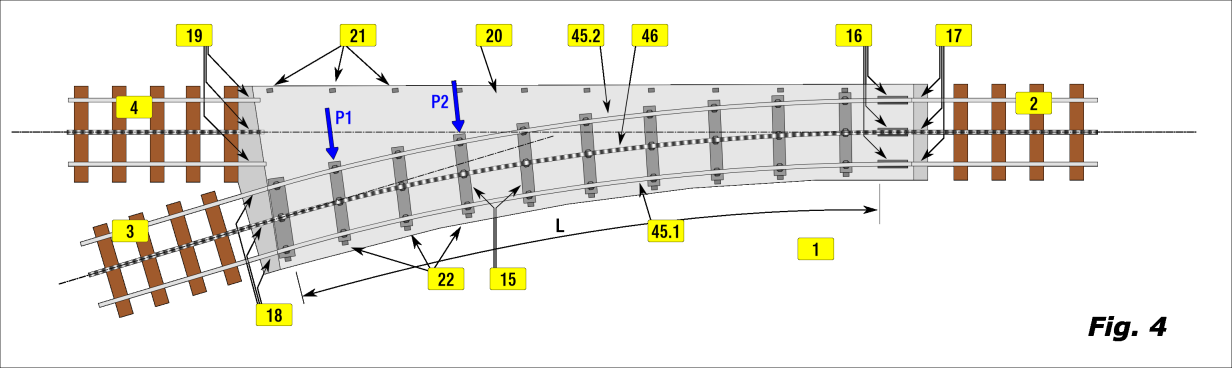 GLEISWEICHE / TRACK POINTS / AIGUILLAGE: RIGI-VTW 2000 Europäisches Patentamt / EUROPÄISCHE PATENTSCHRIFT / EP 1 214 473 B1 / 20.07.2005 Patentblatt 2005/29 / Anmeldenummer: 00958083.8 Anmeldetag: 18.09.2000 / Int Cl.7: E01B 25/06 / Internationale Anmeldenummer: PCT/CH2000/000502 Internationale Veröffentlichungsnummer: WO 2001/021894 (29.03.2001 Gazette 2001/13)